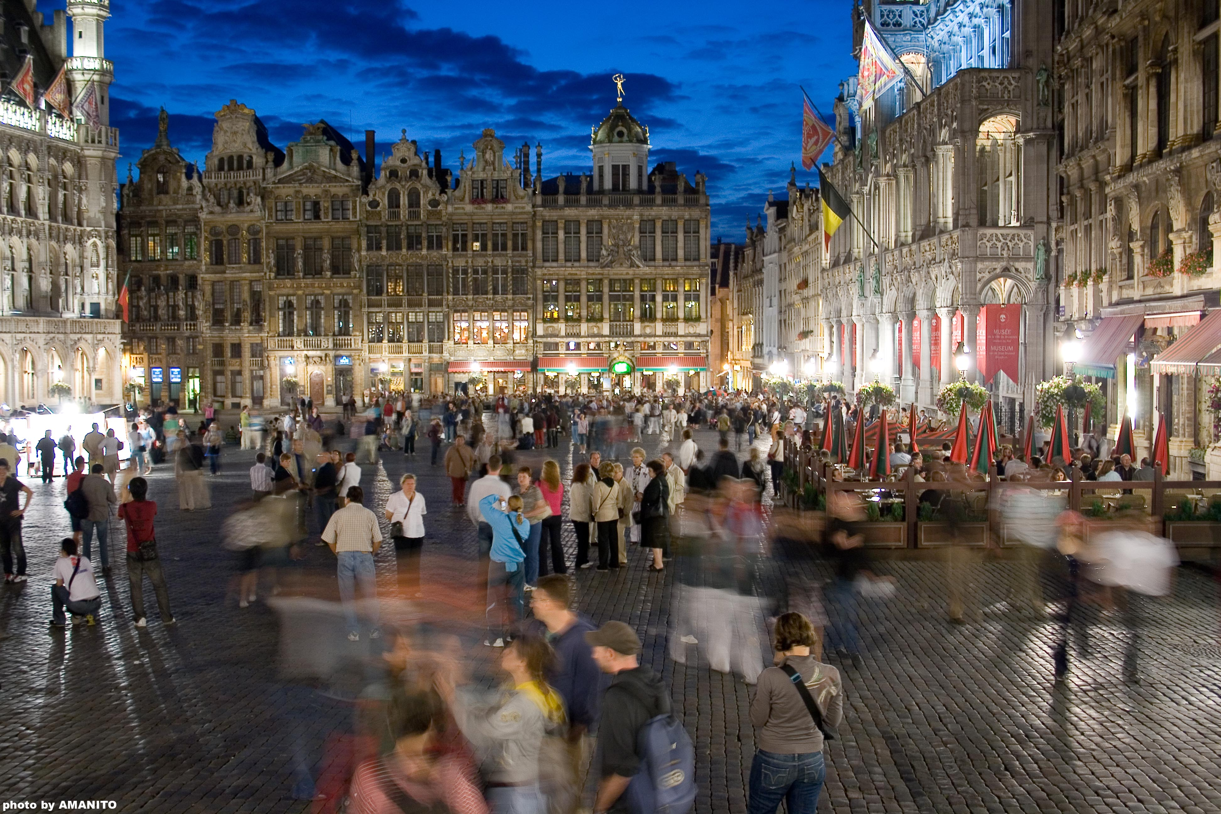 grand place Brussels